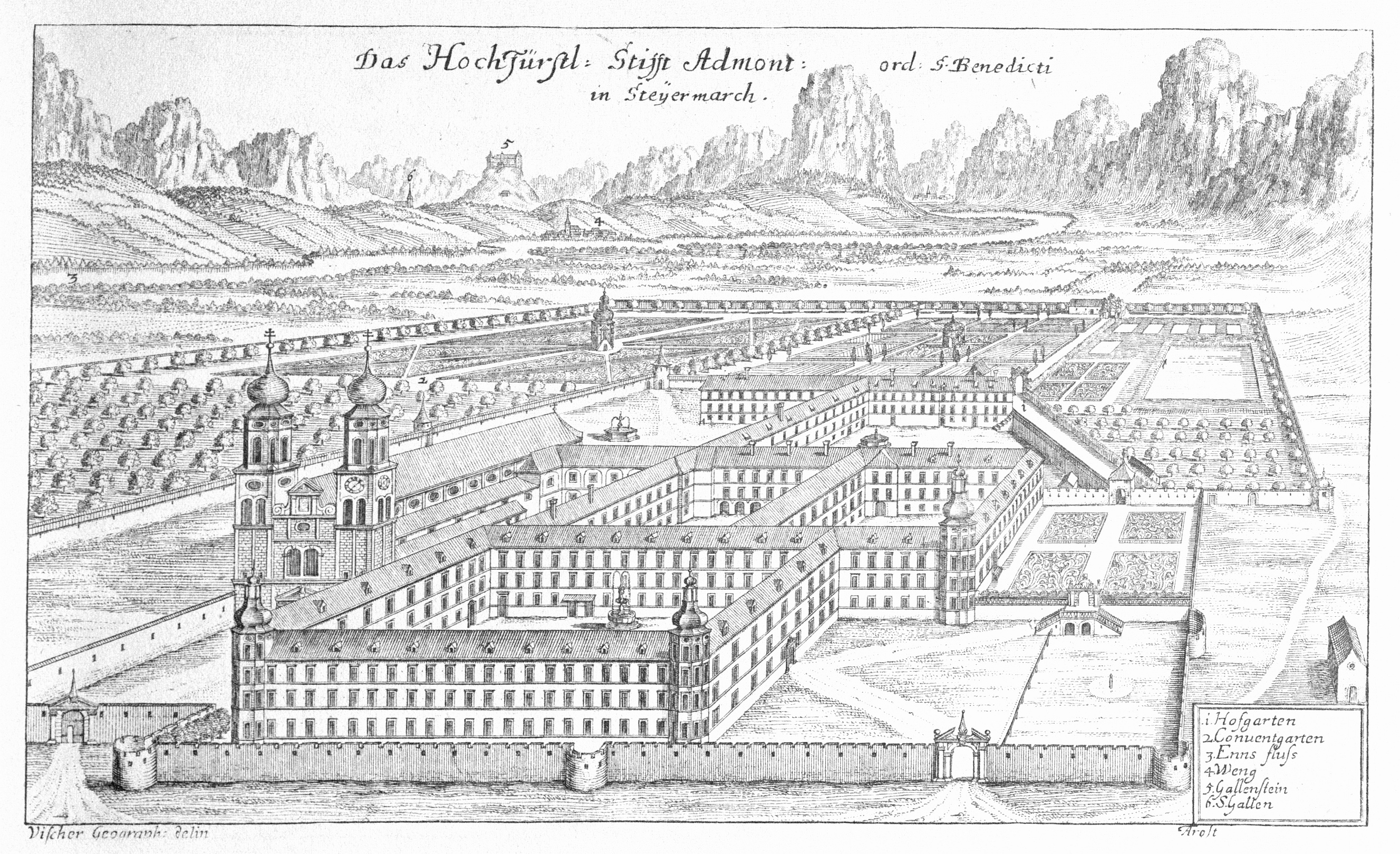 G. M. Vischers Käyserlichen Geographi, Topographia Ducatus Stiriae, Das ist: Eigentliche Delineation / und Abbildung aller Städte / Schlösser / Marcktfleck / Lustgärten / Probsteyen / Stiffter / Clöster und Kirchen / so es sich im Herzogthumb Steyrmarck befinden; Und anjetzo Umb einen billichen Preyß zu finden seynd Bey Johann Bitsch Universitäts Buchhandlern / Auff dem Juden=Platz bey der guldenen Saulen. Graz 1681